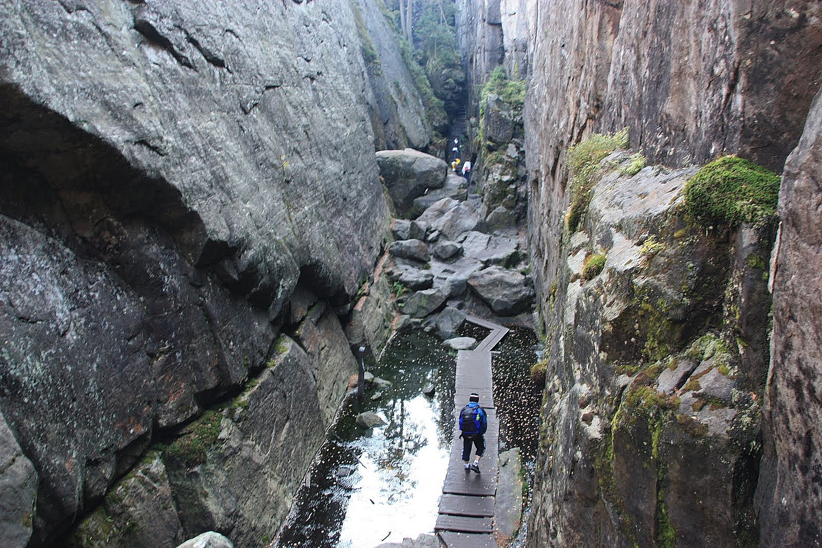 Trasa na Szczelińcu Wielkim